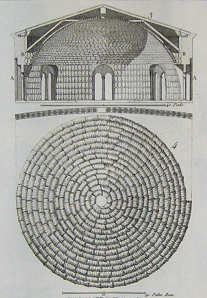 Seroux d'Agincourt, Architecture, Planche XXIII